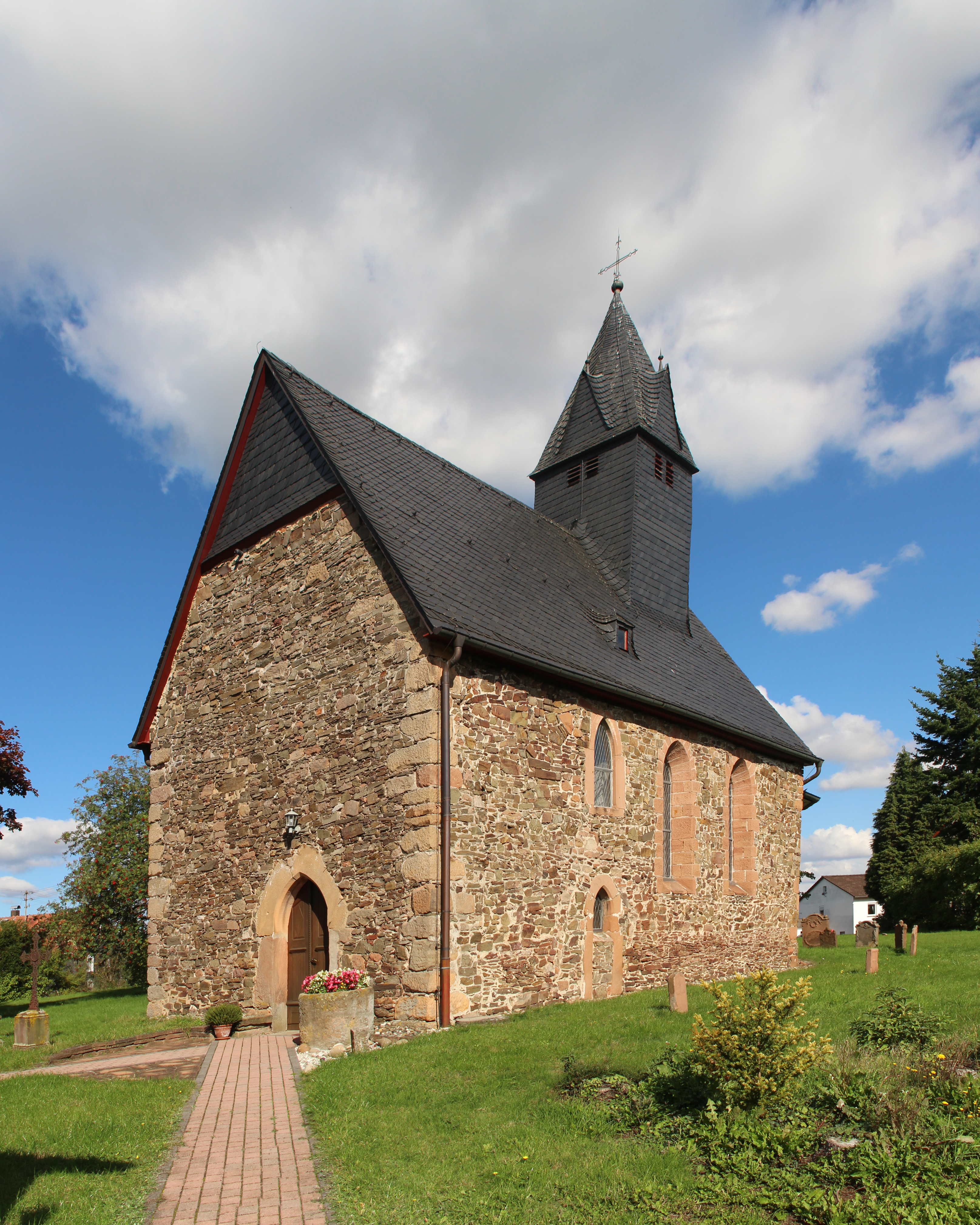 Oberwalgern